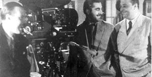 Foto del director argentino Lucas Demare y los libretistas Homero Manzi y Ulyses Petit de Murat